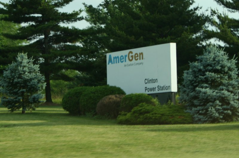 Clinton power station sign, Illinois